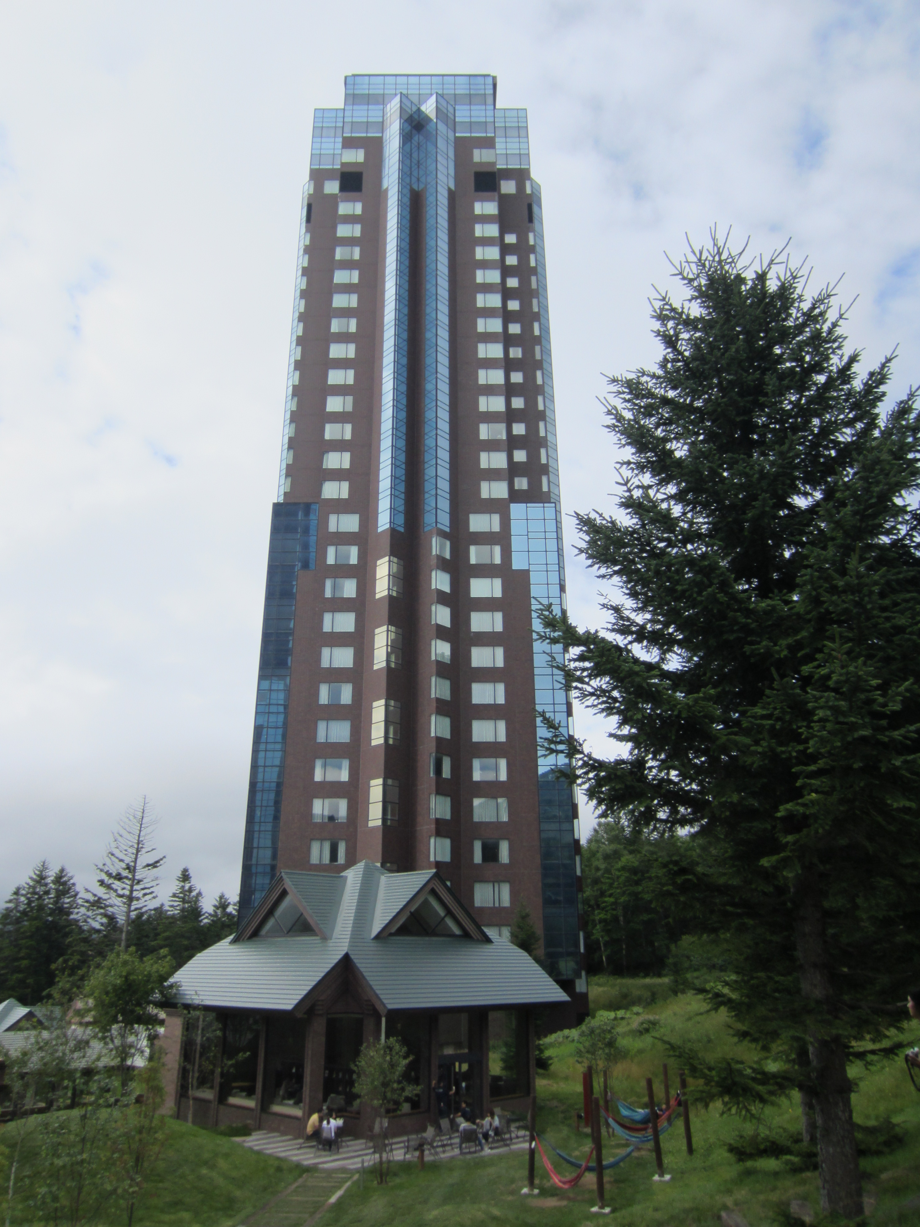 リゾナーレ 星野リゾートトマム